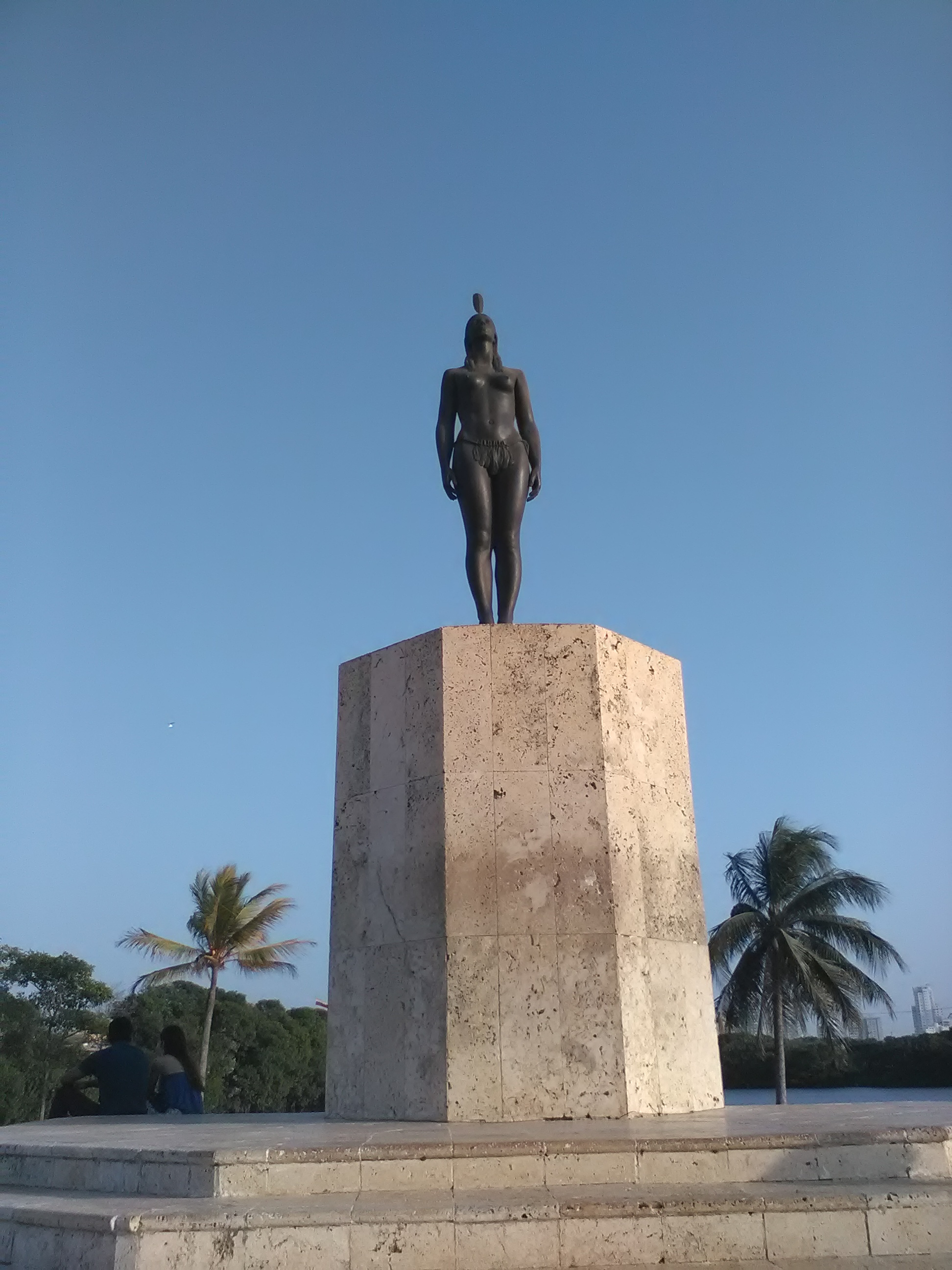 Esta fotografía fue tomada en el municipio colombiano con código 13001.